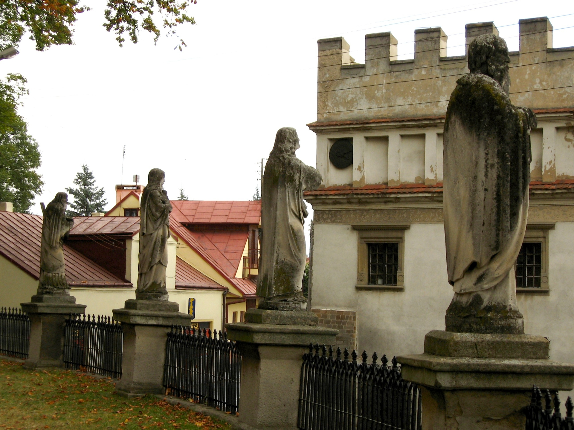 Figury przy kościele Bożego Ciała